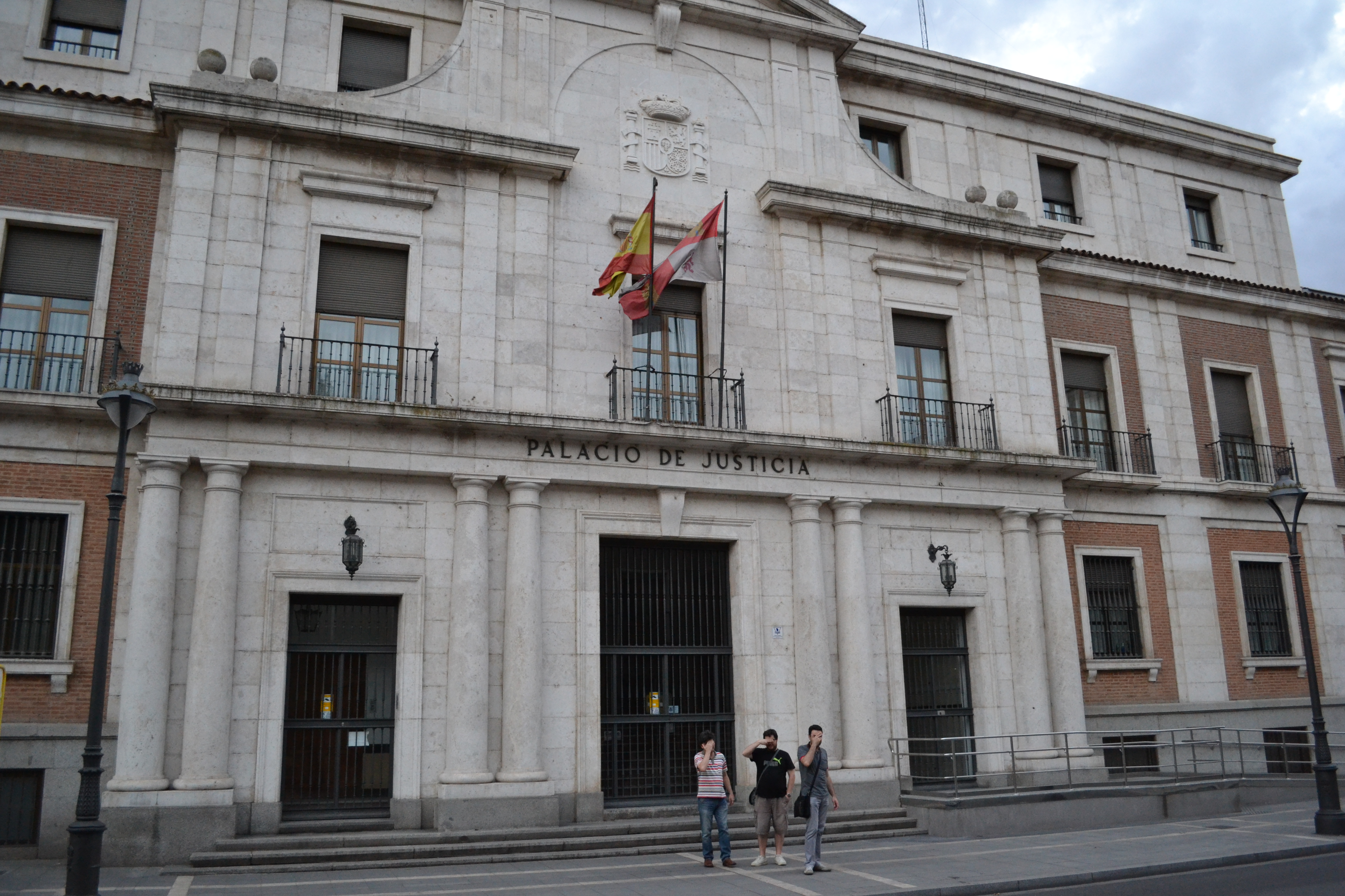 En la Calle de las Angustias ante el Palacio de Justicia (Audiencia Provincial de Valladolid). Wikiencuentro en Valladolid en julio de 2012.